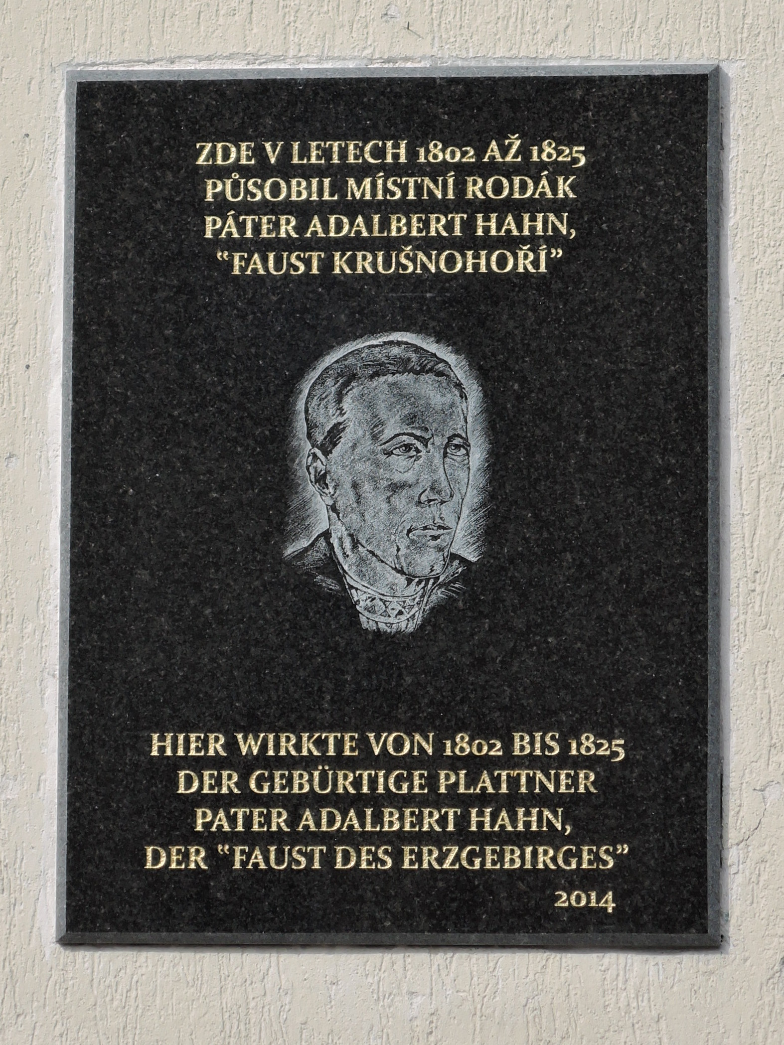 Horní Blatná, kaple sv. Kříže, pamětní deska na stěně kaple